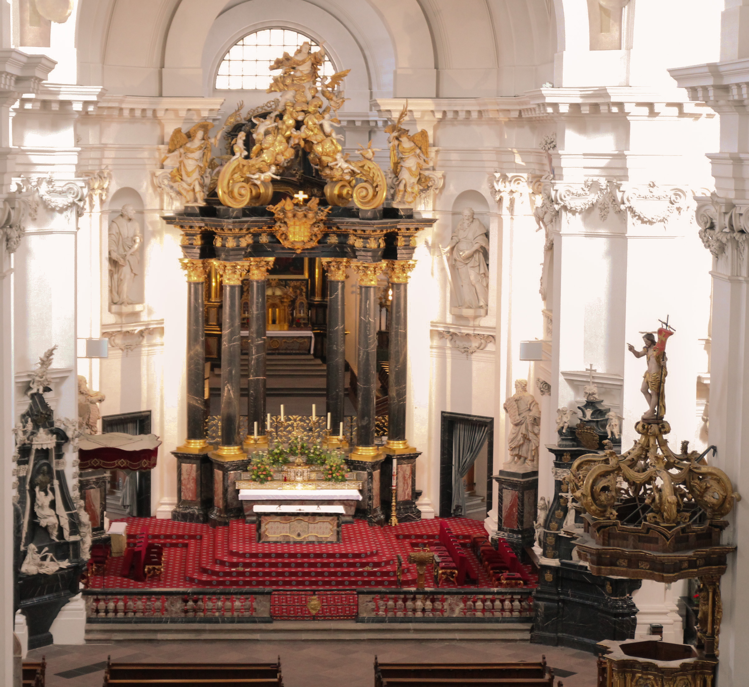 Blick von der Orgel